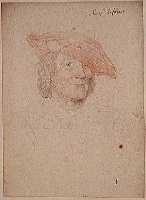 O general francês André de Foix, comandante das Guerras Italianas.